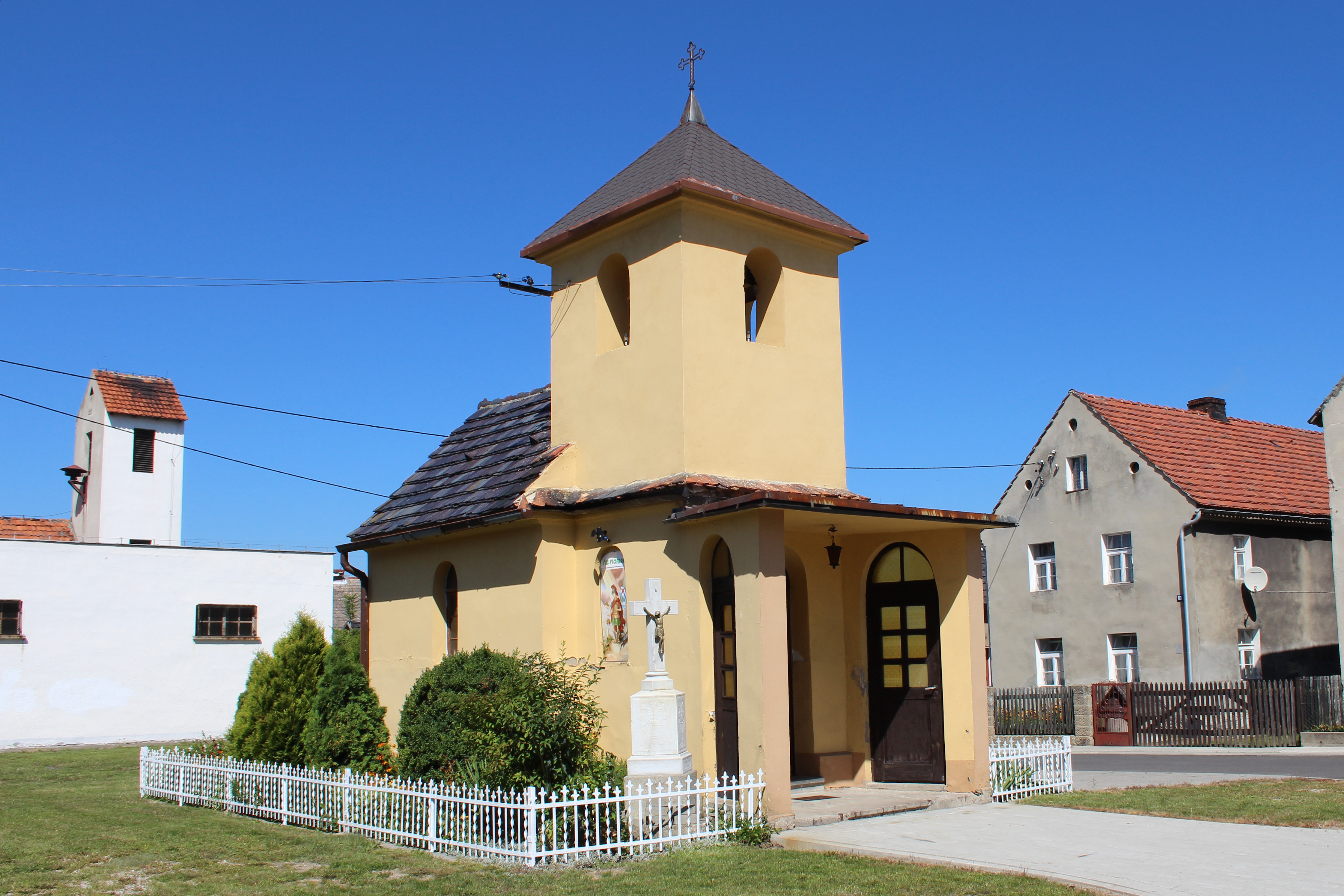 Sowin - kaplica p.w. św. Floriana.